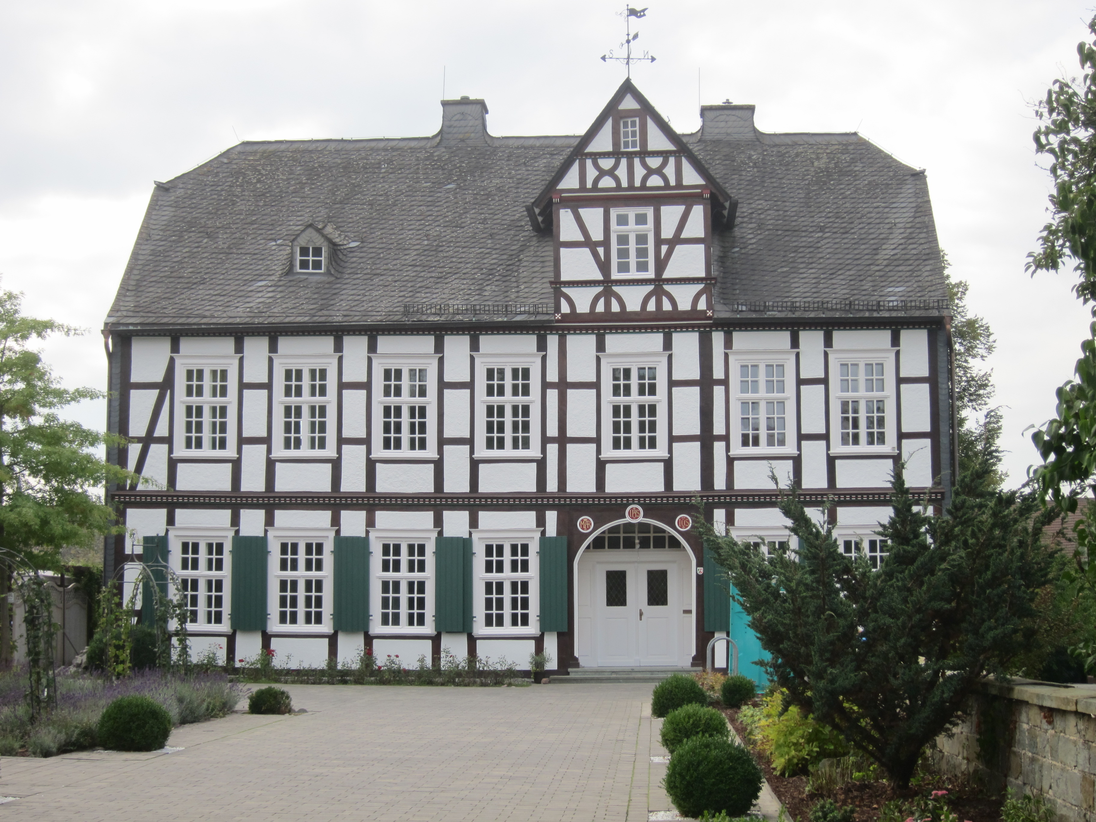 Pastoratsgebäude Anröchte This is a photograph of an architectural monument.